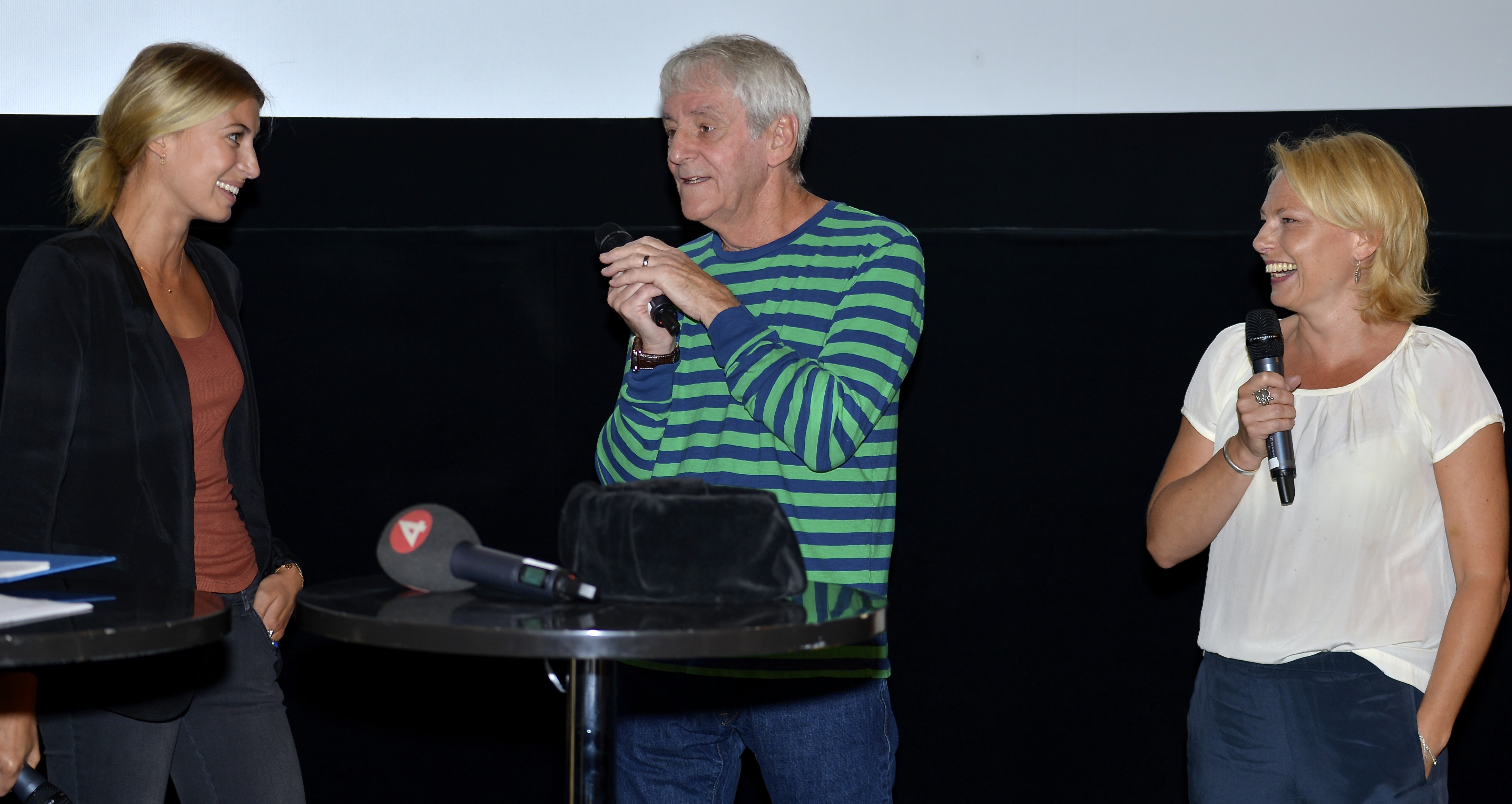 Cecilia Forss, Colin Nutley och Helena Bergström under presentation av den Svenska filmhösten 2014 på Bio Victor i Filmhuset i Stockholm den 18 augusti 2014. Arrangörer: Svenska Filminstitutet och Film&TV-Producenterna.